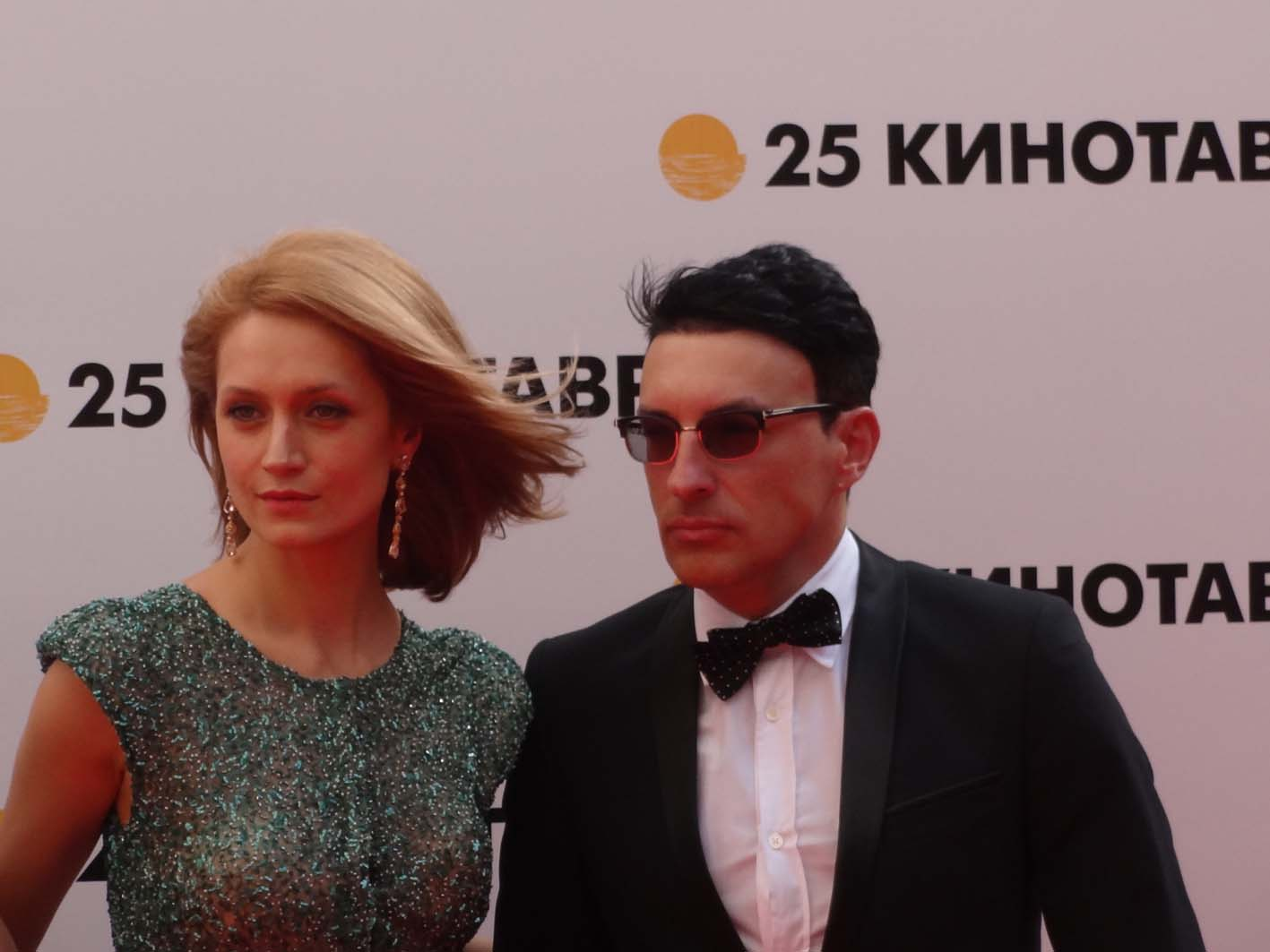 Церемония открытия фестиваля "Кинотавр -2014" в Сочи.